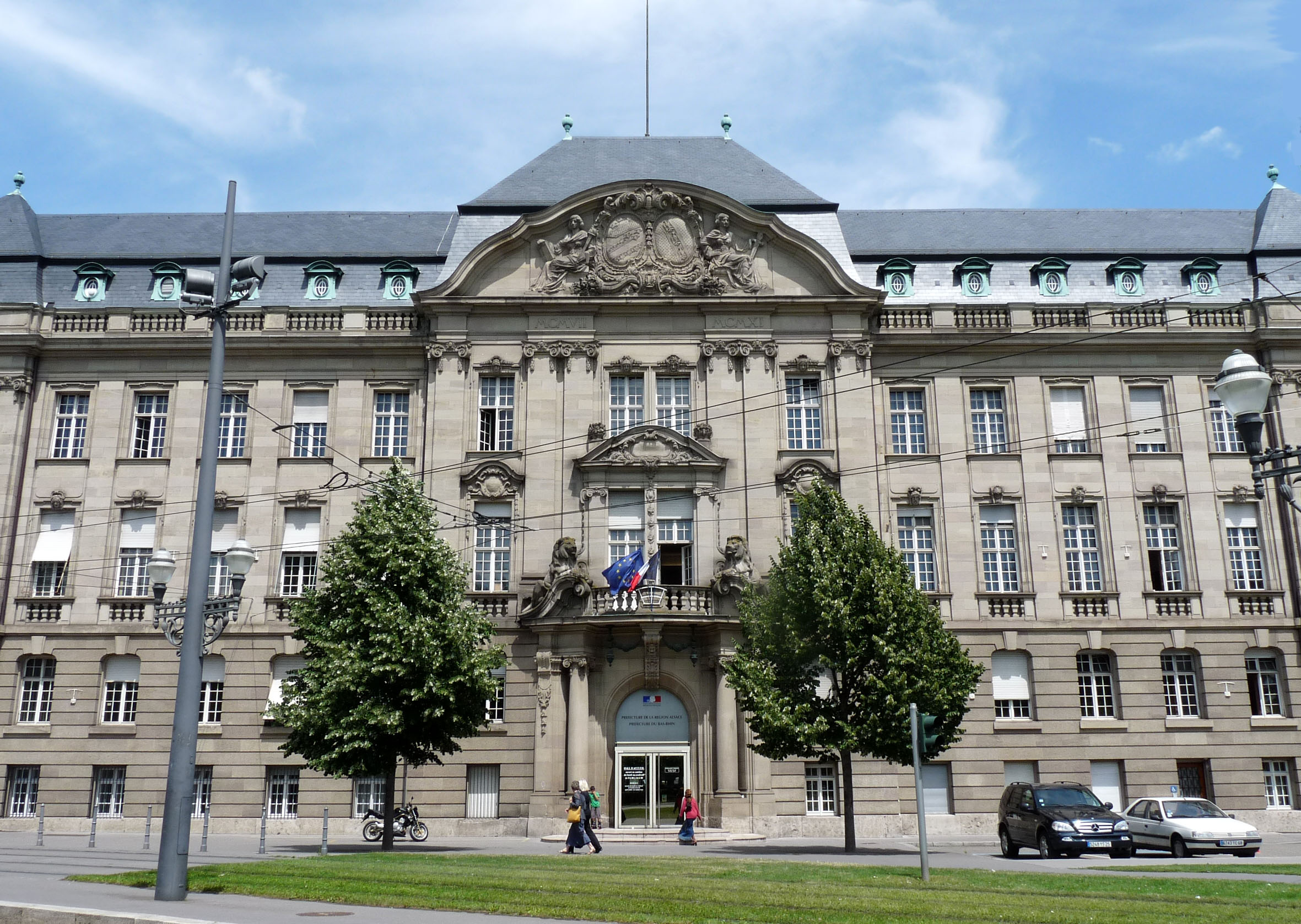 Préfecture de la Région Alsace ; Préfecture du Bas-Rhin (Strasbourg)